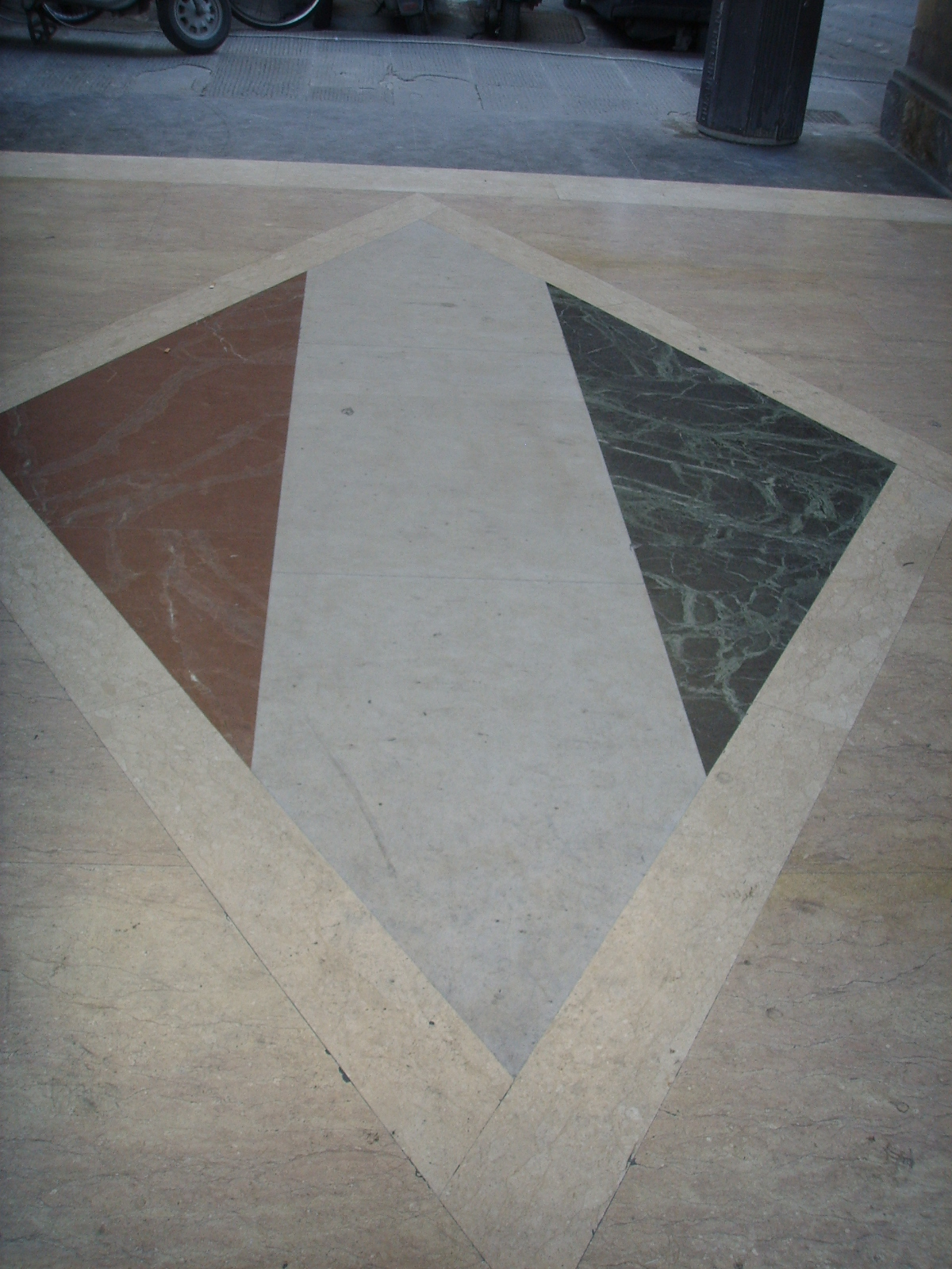 Palazzo delle poste (Firenze), loggiato esterno, pavimento, bandiera italiana